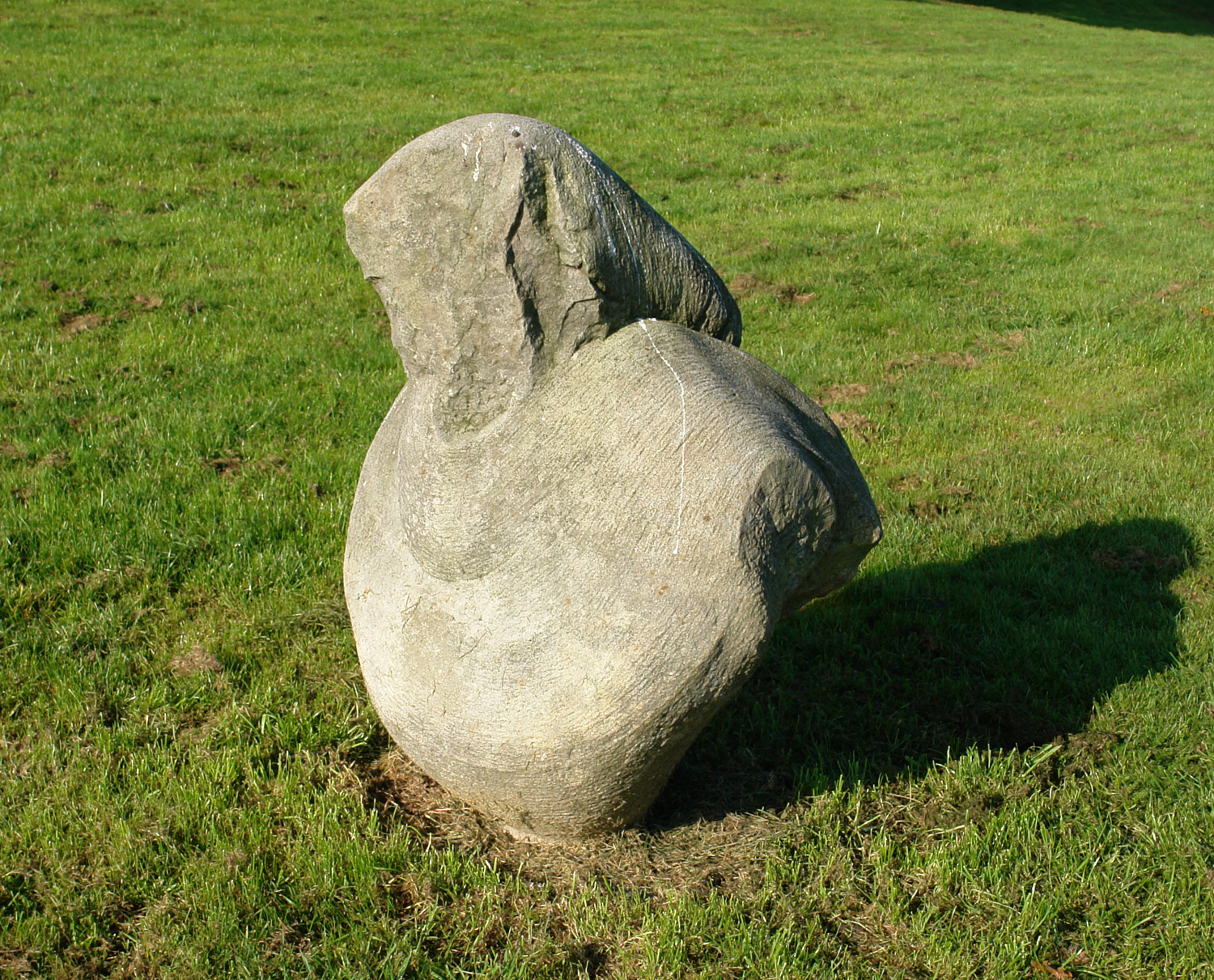 Tide. Aufstellungsort: an der Deichschart am Werdersee in der Neustadt. Anlass: Im Rahmen des Projektes Bildhauer-Symposium 1986 gestalteten sechs internationale Künstlerinnen und Künstler und ein Gast Skulpturen in den Wallanlagen hinter der Kunsthalle in Bremen-Mitte. Aufstellungsort: Die Aufstellung der Skulptur erfolgte 1987 an der Deichschart am Werdersee in der Neustadt. Material: Ibbenbürener Sandstein, ca. 1,5 m. Entwurf und Ausführung: Zygfryd Korpalski k: kunst im öffentlichen raum bremen